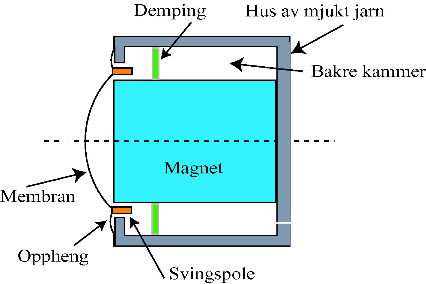 Svingspolemikrofon